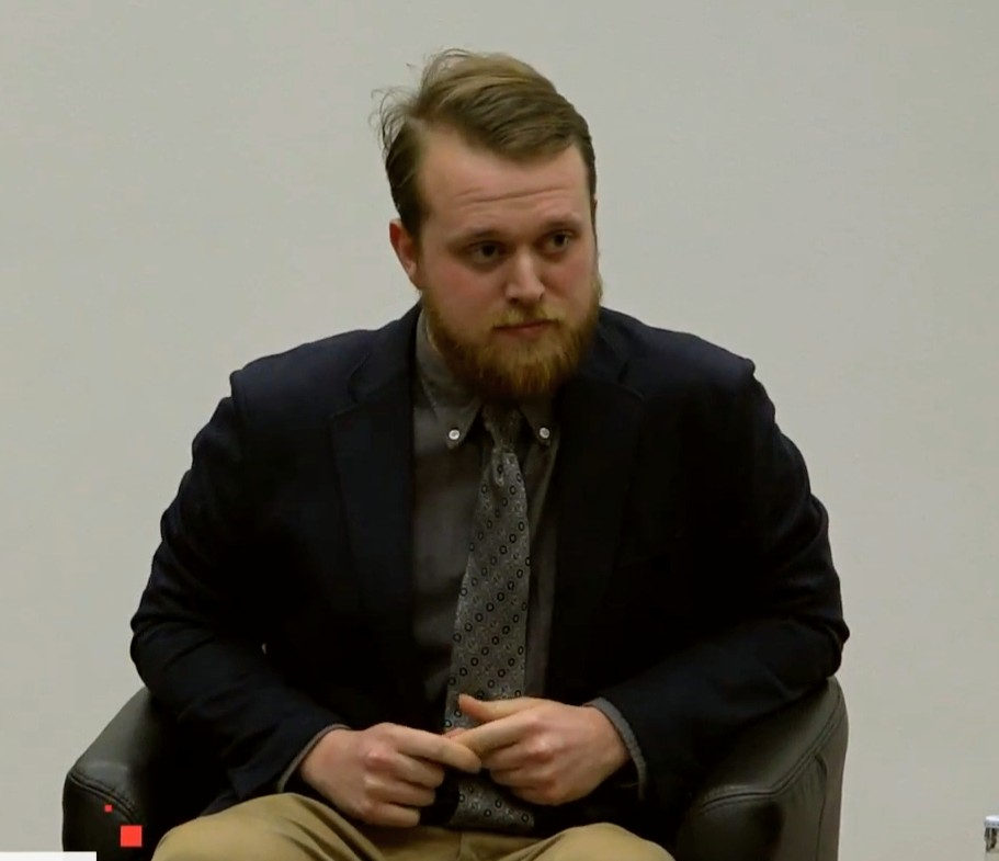 Buchvorstellung, Autorengespräch mit Jack Urwin und Lesung eines Ausschnitts aus der deutschen Übersetzung von "Boys don't cry". Die Fragen stellt Katrin Gottschalk (stellv. Chefredakteurin taz.die tageszeitung). Eine Kooperation von Edition Nautilus, taz.die tageszeitung und der Rosa-Luxemburg-Stiftung.